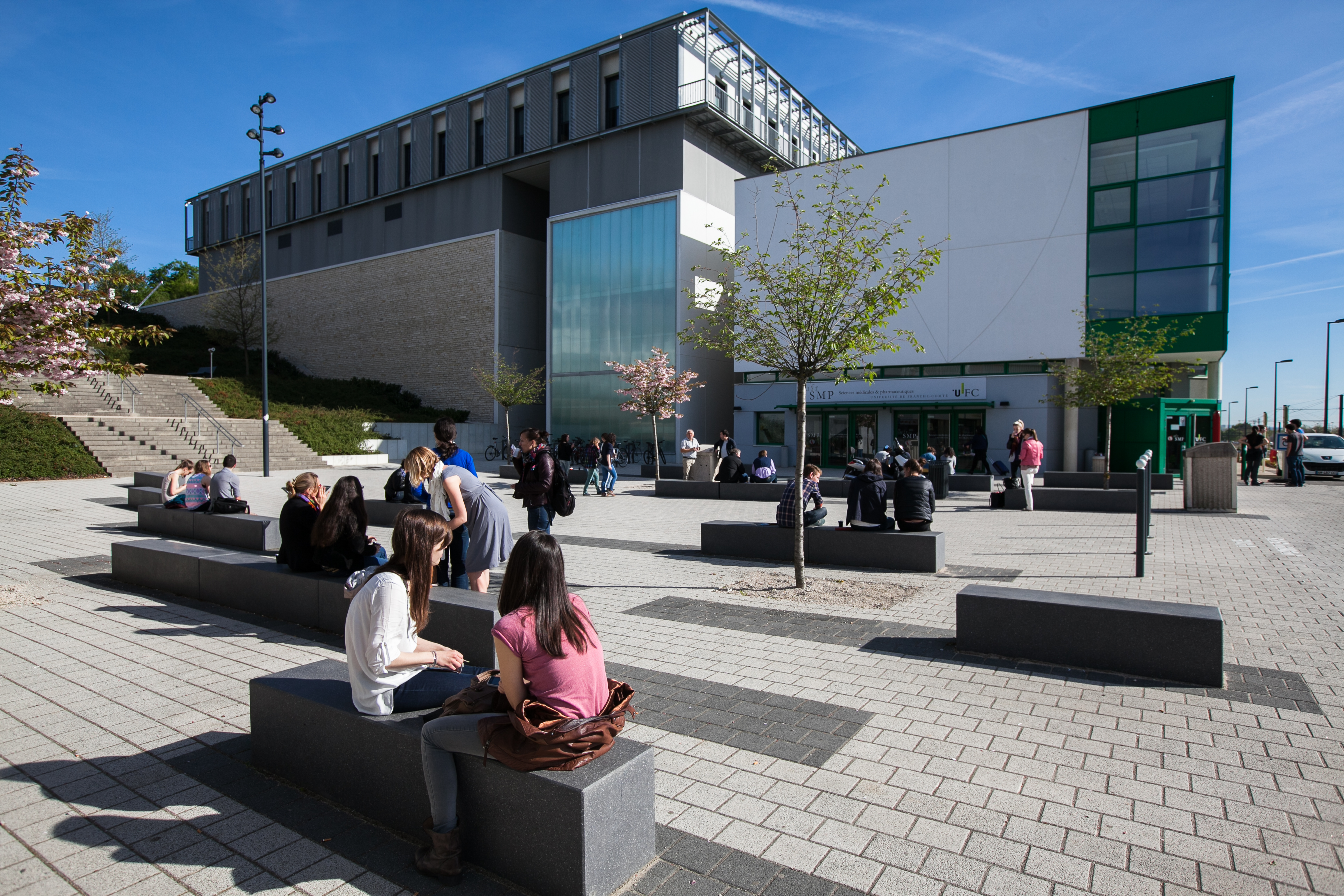 Vue extérieure de l'UFR Sciences médicales et pharmaceutiques?